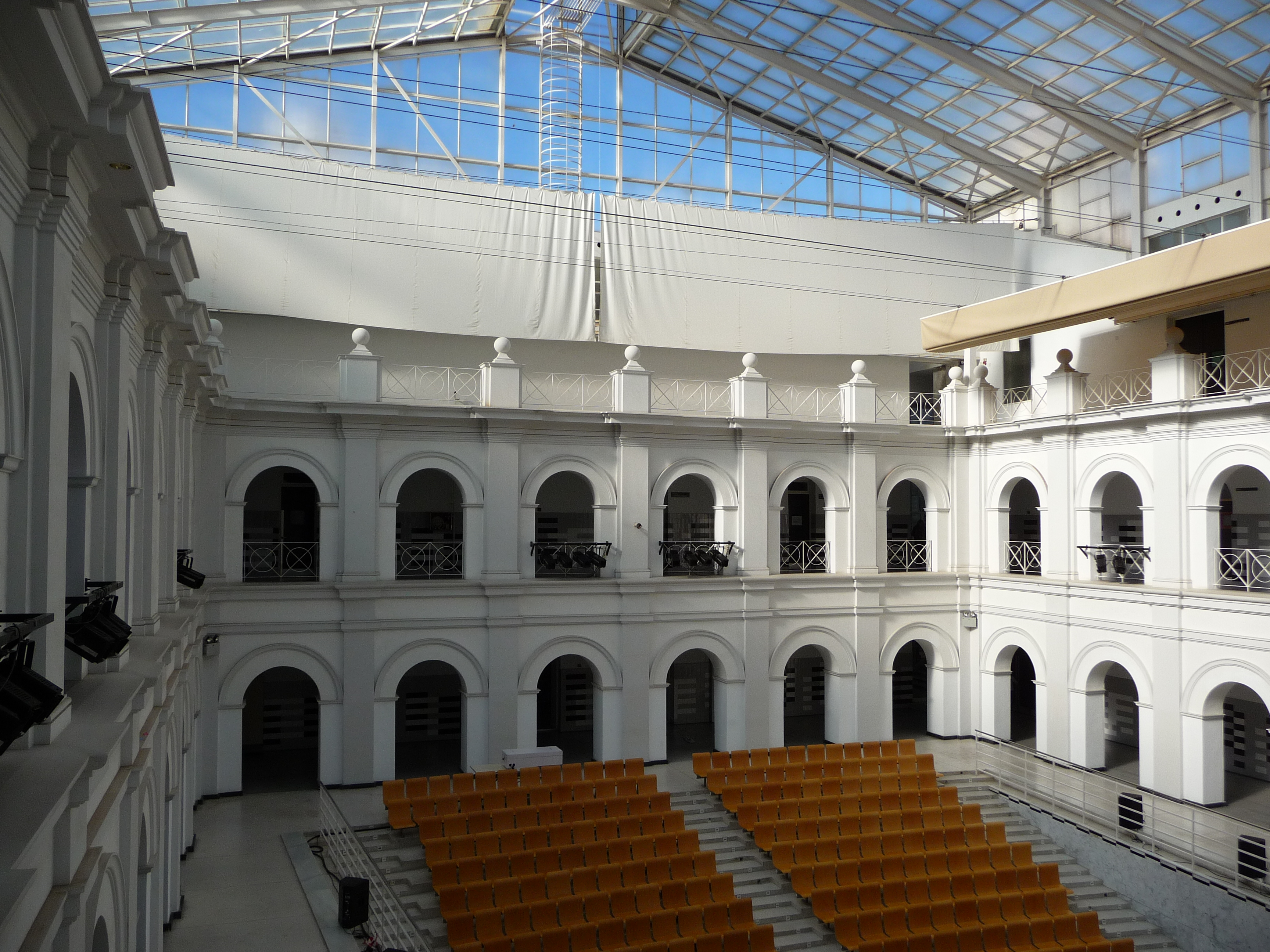 Exconvent de la Mercé, Borriana